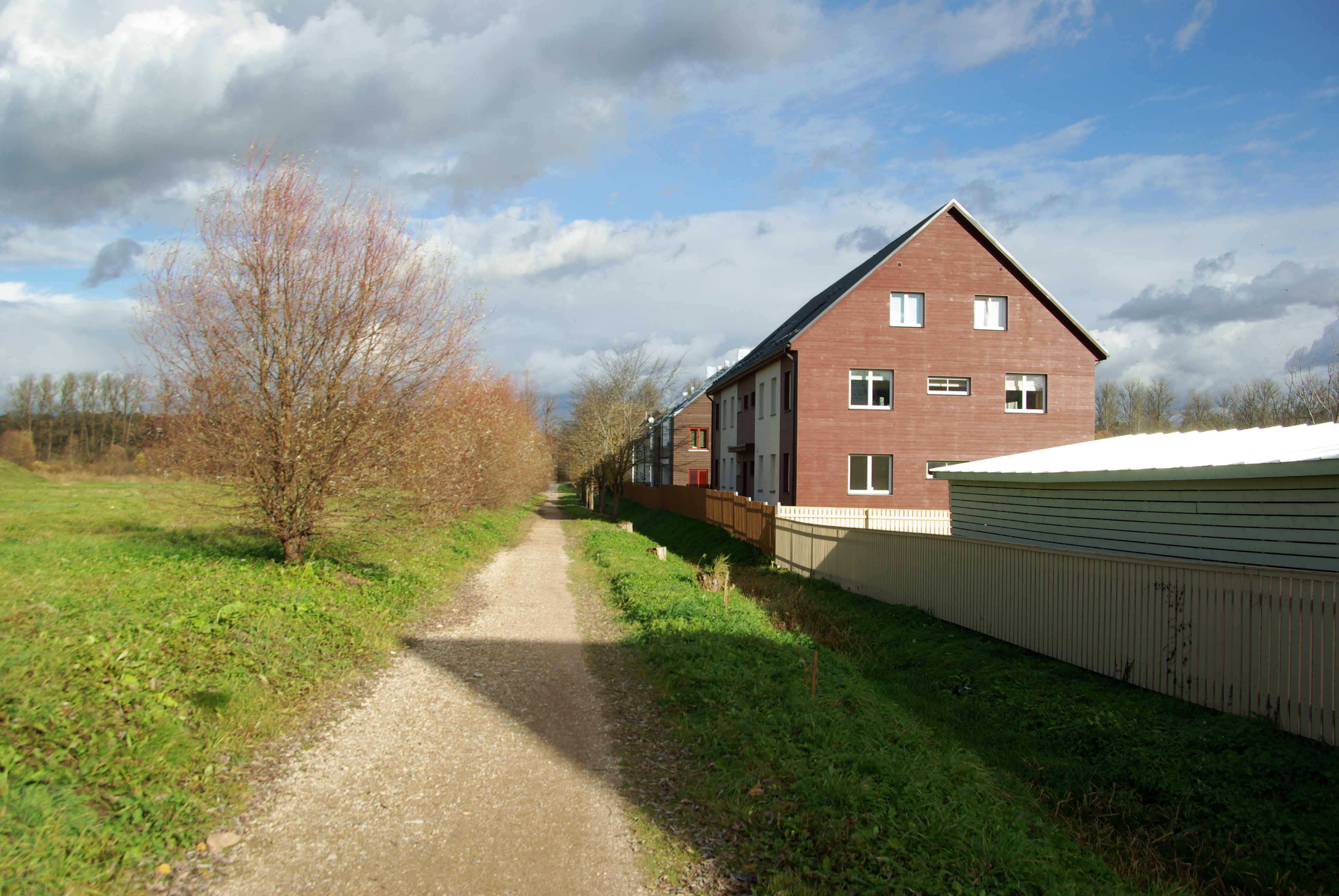 tänav Tartus, Supilinnas